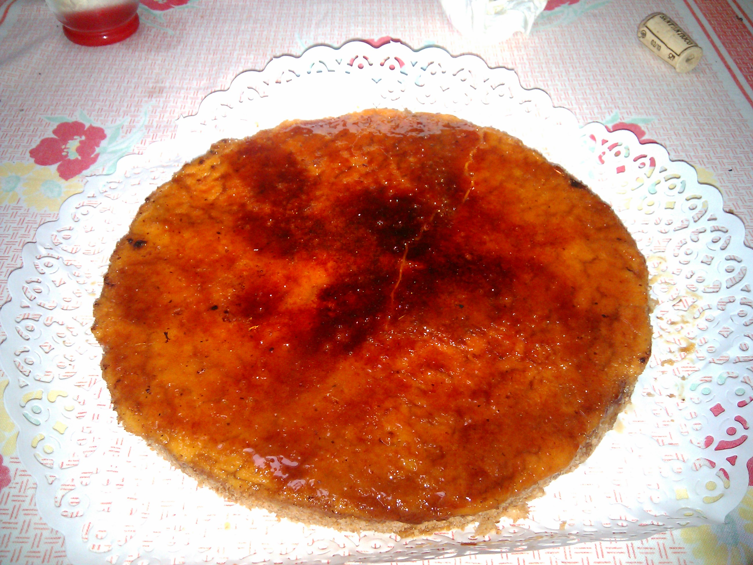 Crema bruciata